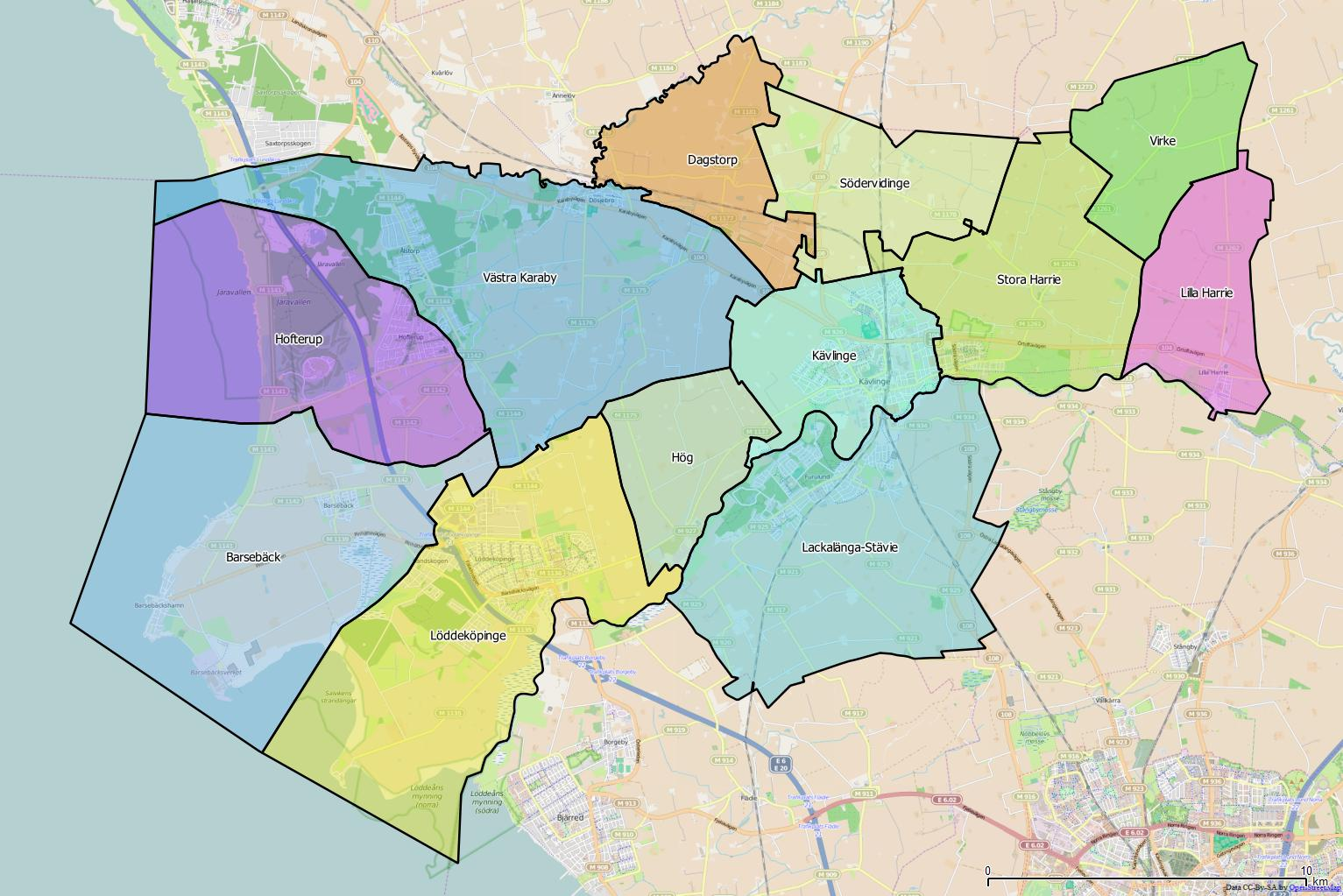 Distriktsindelningen i Kristinehamns kommun World file: 27.47262358473921395 0 0 -27.47262358473921395 1431685.10868717567063868 7528917.48306541610509157